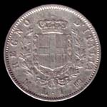 1 lira 1863 retro (c) Pietro